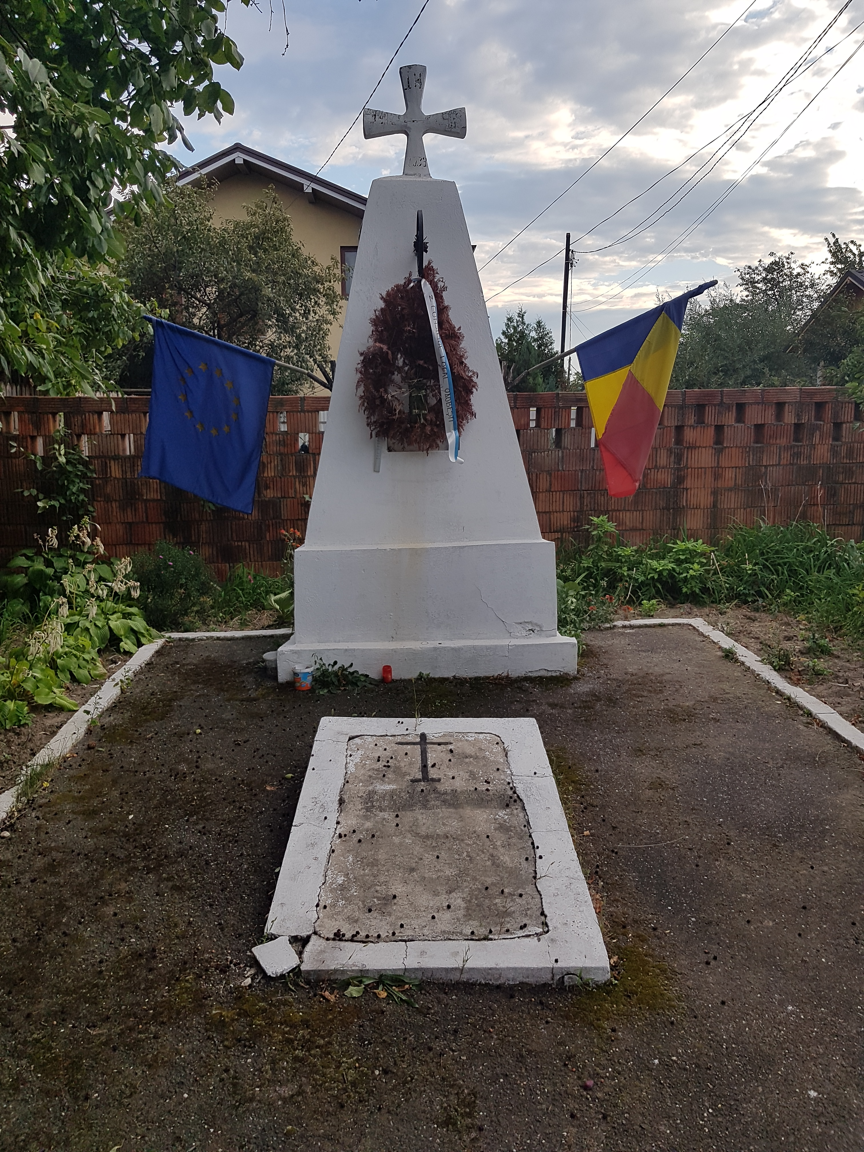 Monumentul Eroilor (1916 - 1918)